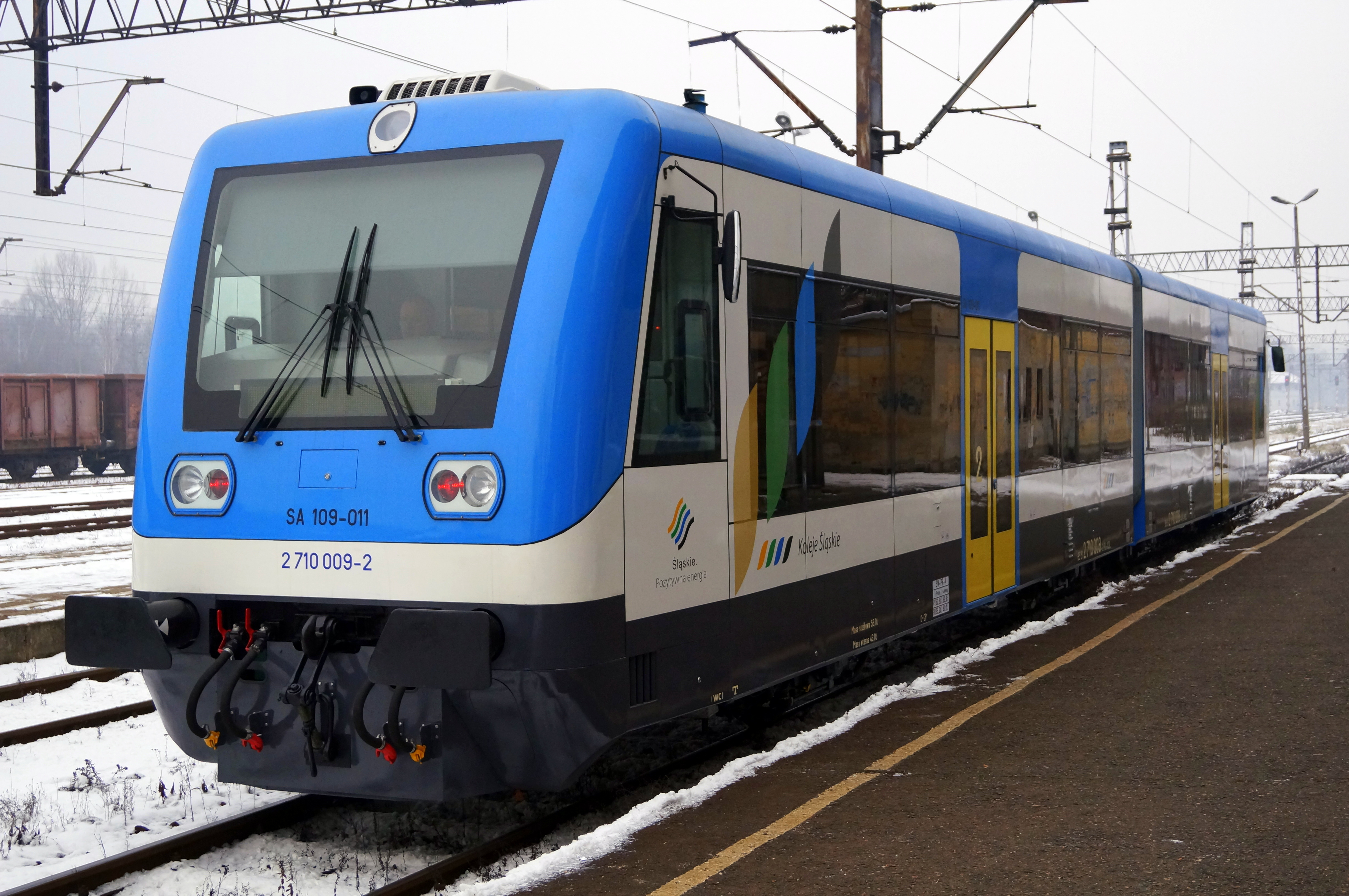 Szynobus SA109-11 Kolei Śląskich relacji Wodzisław Śląski - Pszczyna oczekuje na odjazd ze stacji początkowej